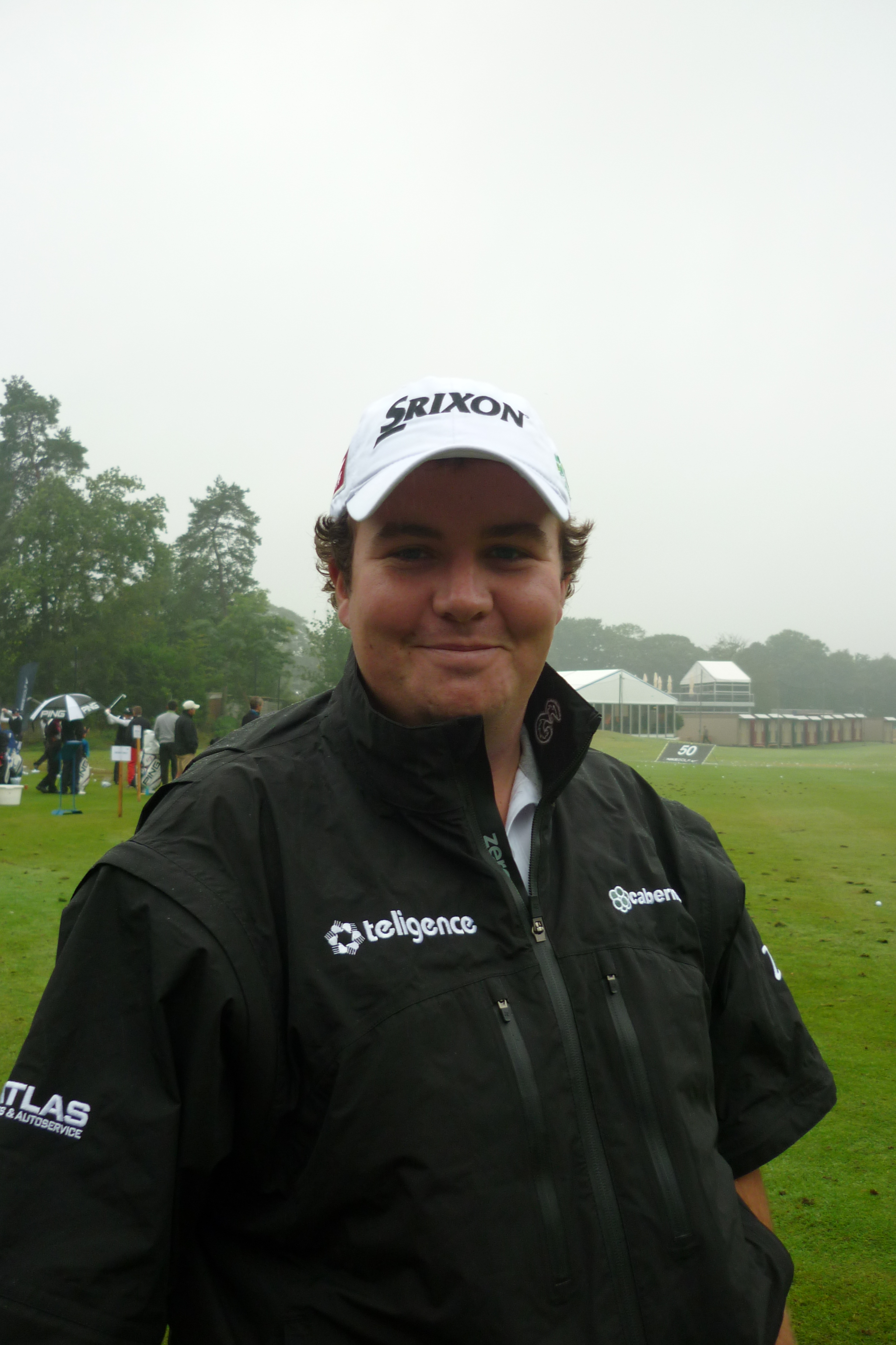 Paul Lowry op KLM Open 2010